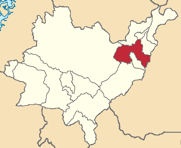 Mapa localizacor del cantón en Azuay, Ecuador